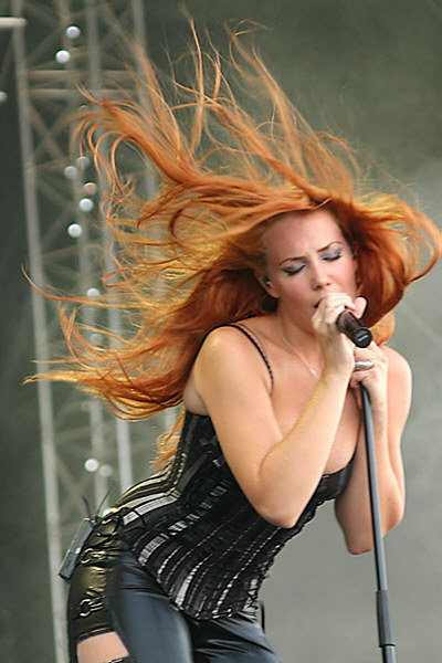 Simone Simons, Sängerin von Epica. Konzertfoto vom Mera Luna